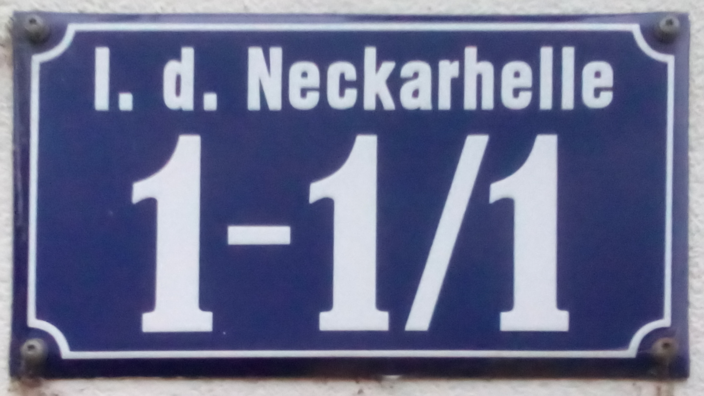 Hausnummernergänzung in Heidelberg